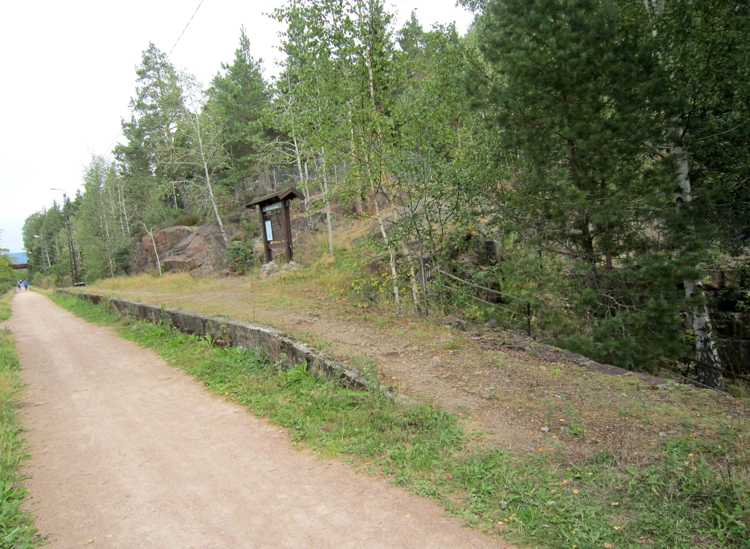 Gullaug holdeplass på den nedlagte delen av gamle Drammenbanen (forelengelsen av Spikkestadlinjen)